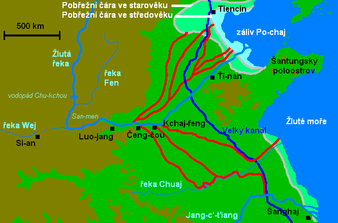 Schematické znázornění změn dolního toku Žluté řeky v historické době. Nakreslil Miaow Miaow v březnu 2005. Jako hlavní zdroj byla použita mapa v knize: Caroline Blunden a Mark Elvin: Svět Číny (Praha, Knižní Klub 1997), s. 16, ISBN 8071764205.